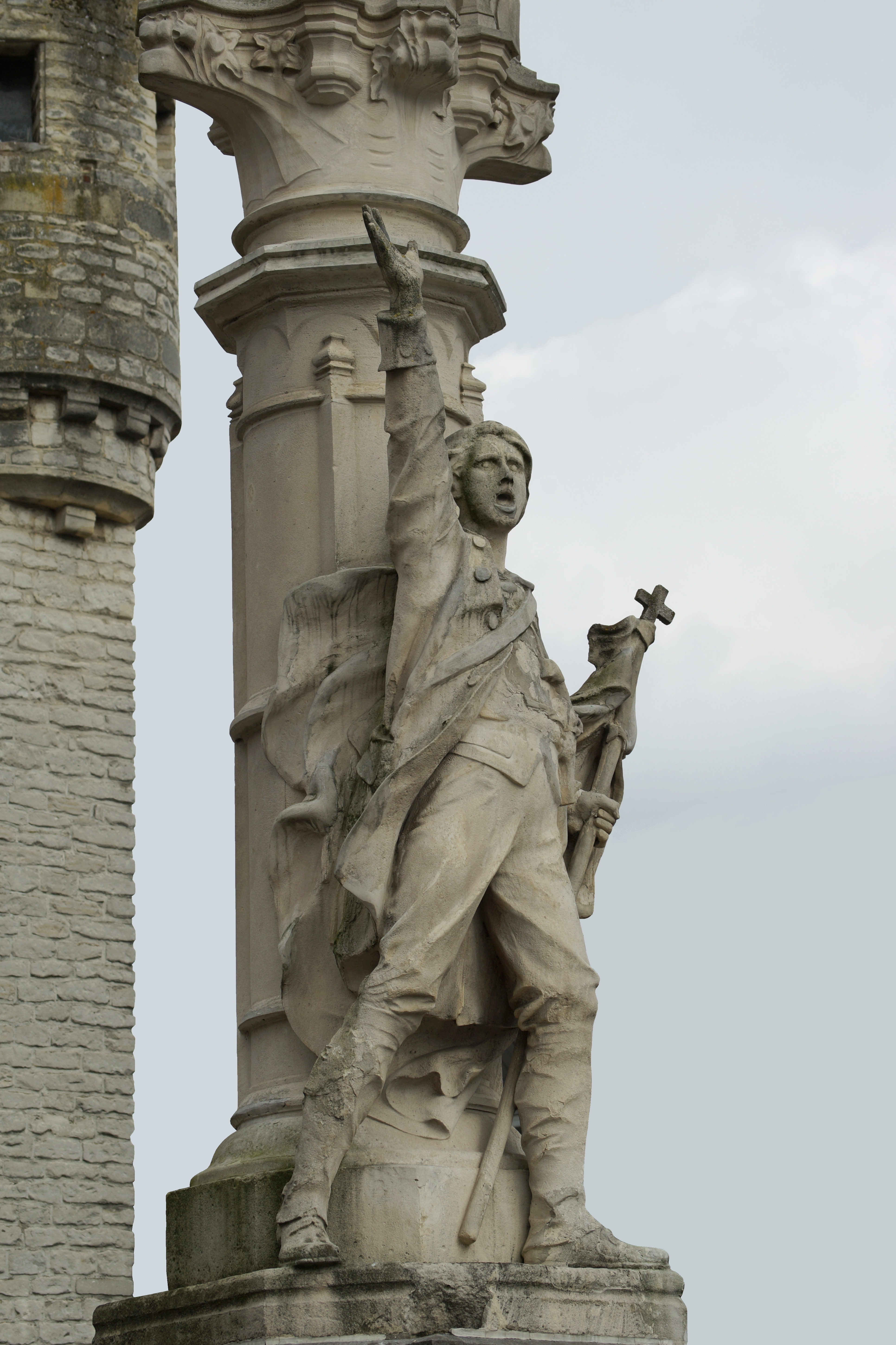 Herentals - Detail van het standbeeld "De Boerenkrijger" gemaakt door beeldhouwer Frans Deckers (bewerkt fotomateriaal)